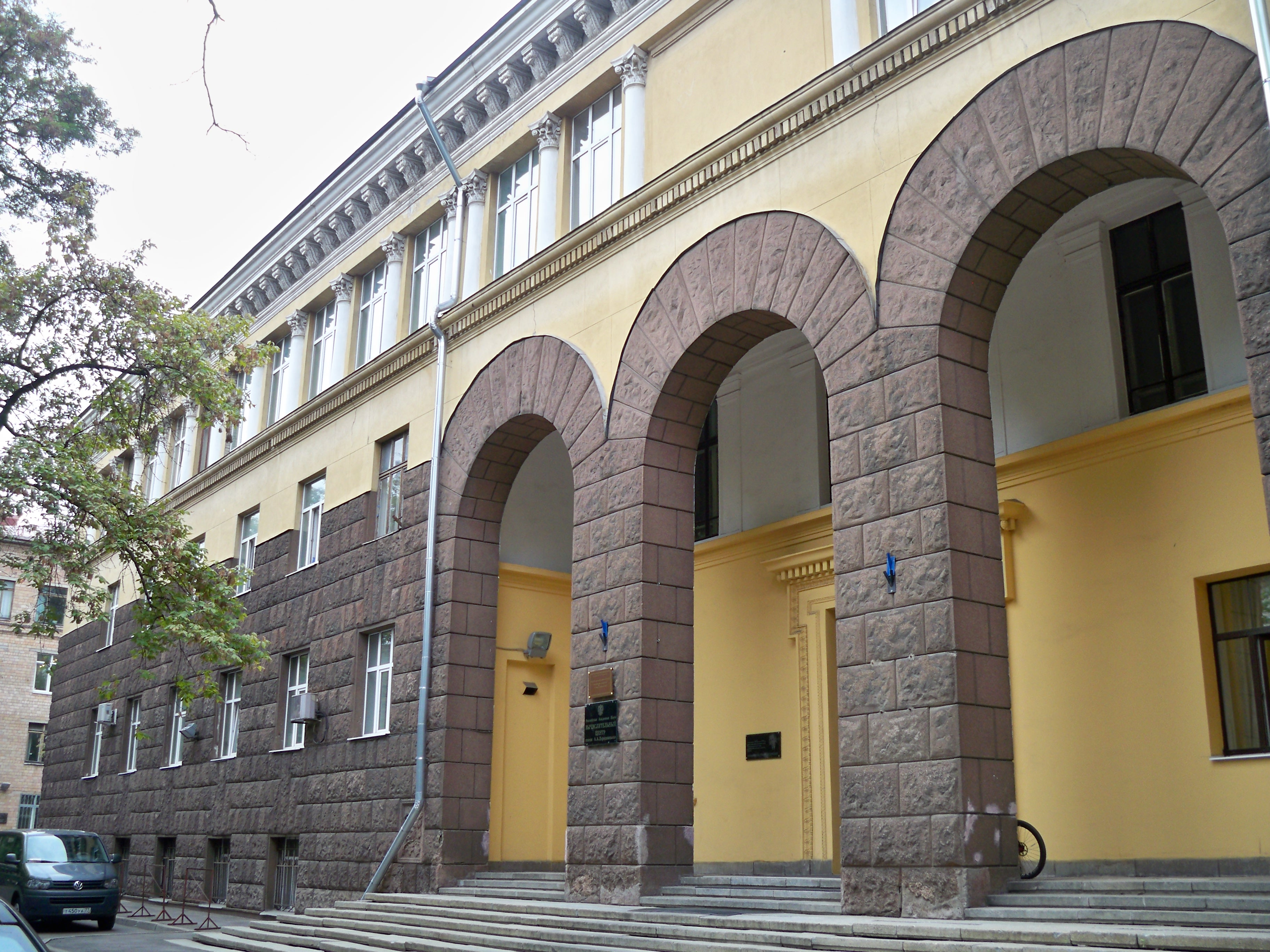 Вид главного здания ВЦ РАН (Москва)